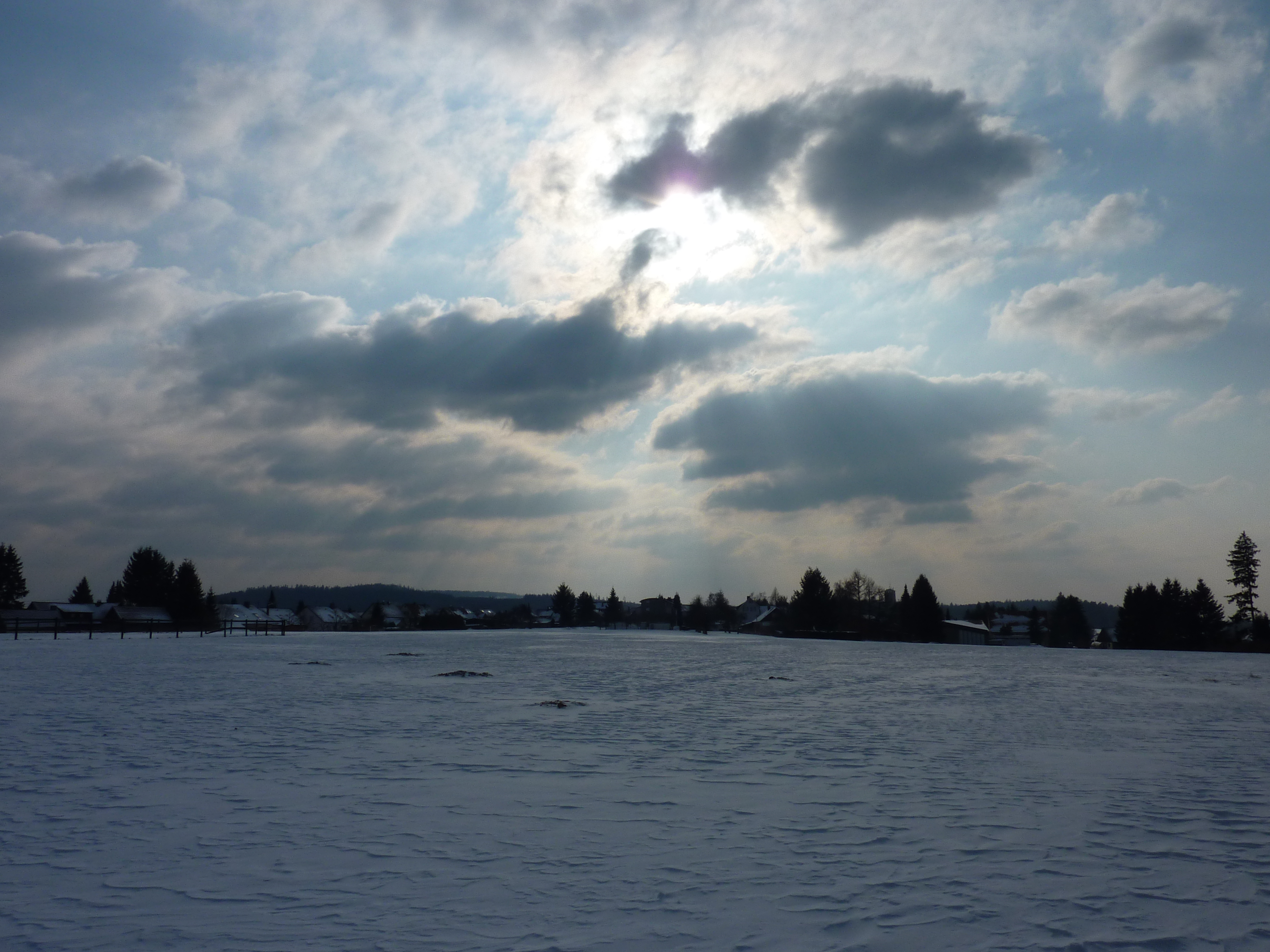 bei Dobel